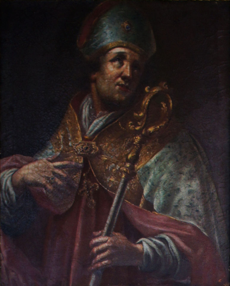 Porträtgemälde von Konrad IV. von Klingenberg, Fürstbischof von Freising, im Fürstengang zwischen Fürstbischöflicher Residenz und Freisinger Dom.